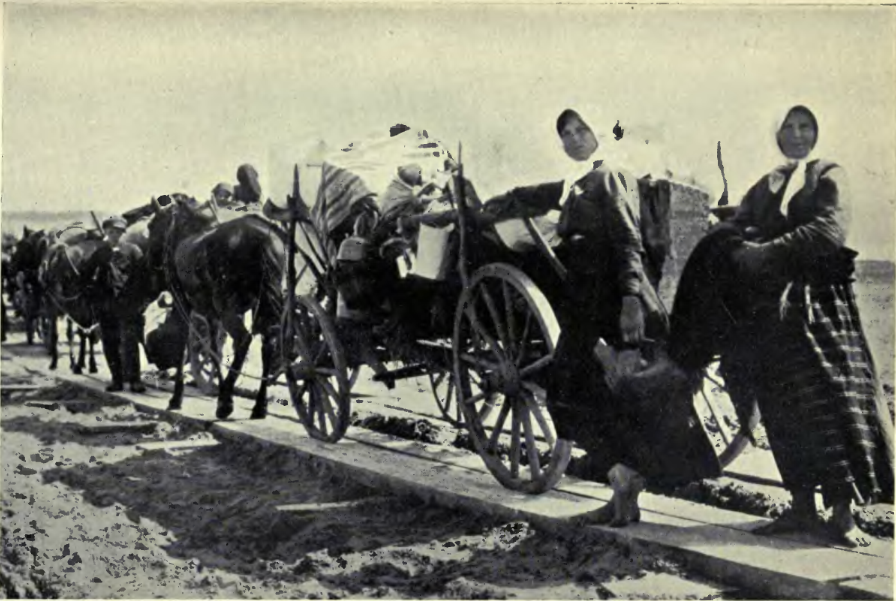 Refugiados húngaros durante la posguerra de la Primera Guerra Mundial.